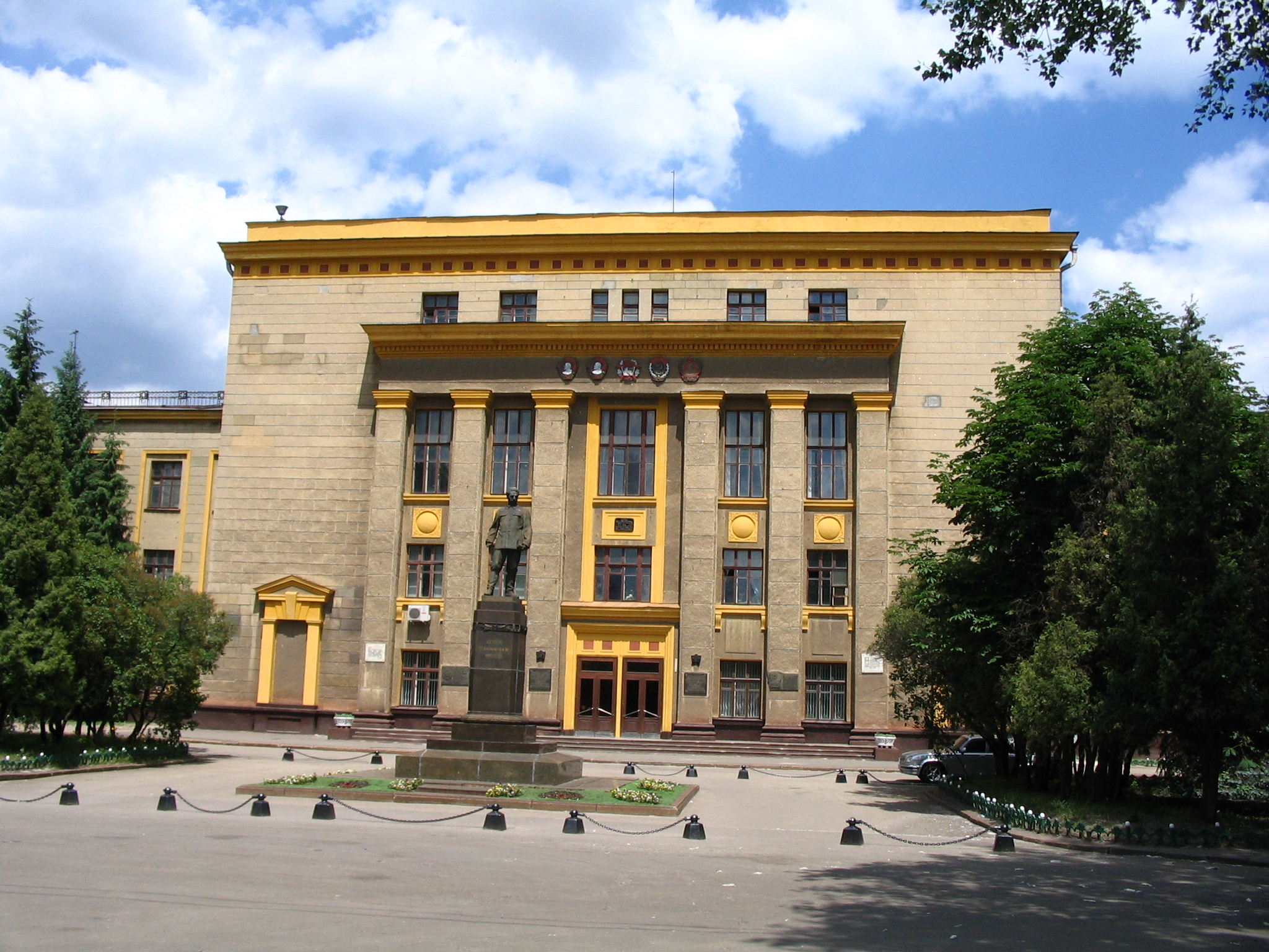 Головна контора ХТЗ, Харків, пр. Московський, 275